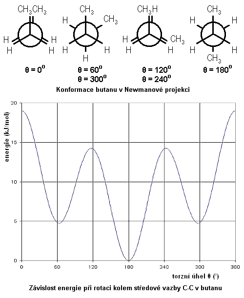 Konformace butanu. Naoře konformace na středové vazbě C-C butanu v Newmanově projekci, dole závislost energie na trozním úhlu na středové vazbě v butanu Autor: Antonín Vtek, e-mail: avitek(at)lib(dot)cas(dot)cz Částečně použito obrázku z německé wikipedie